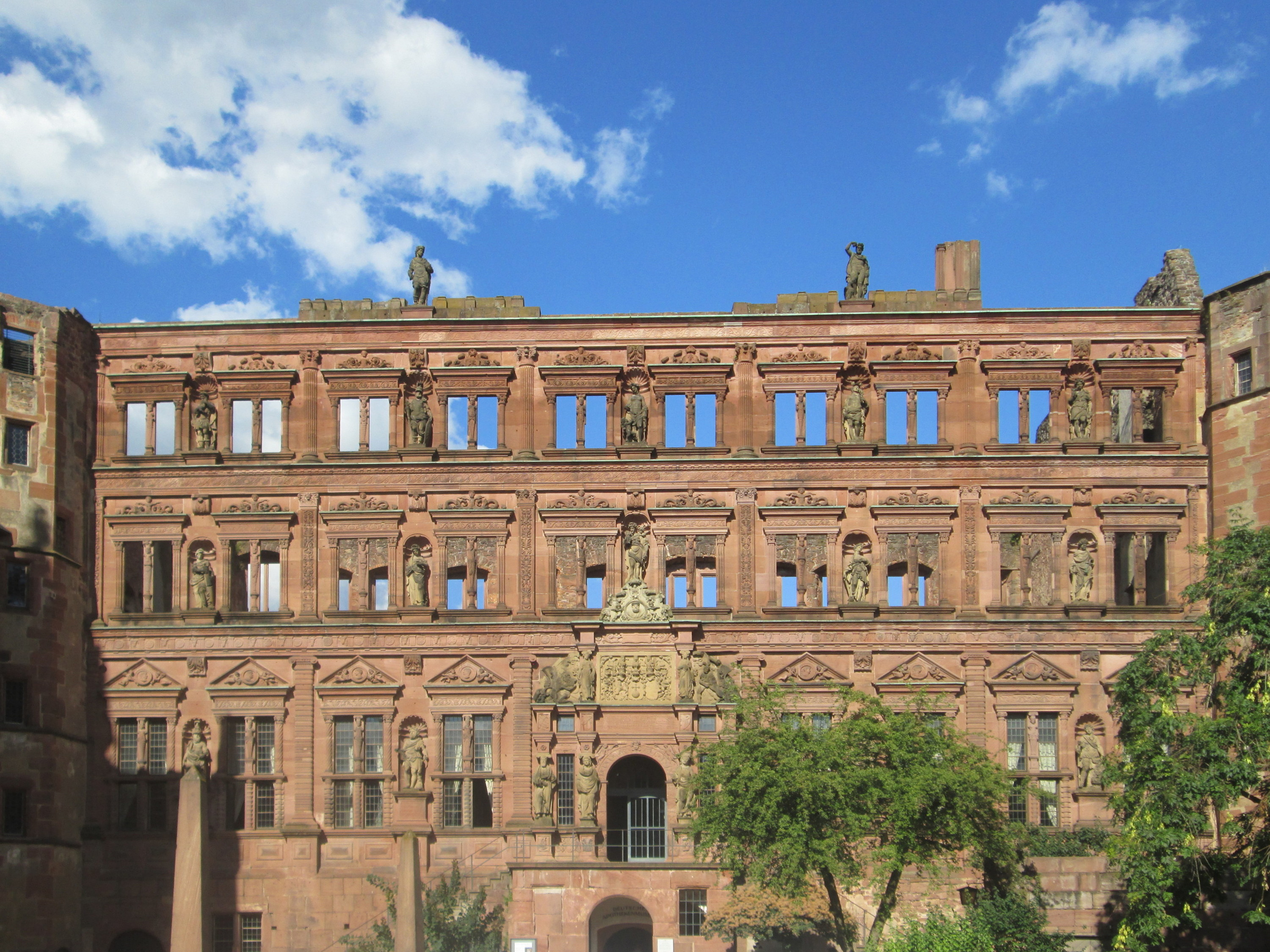 Ottheinrichsbau vom Heidelberger Schloss - ab 1556 unter Kurfürst Ottheinrich von der Pfalz als prächtiges Renaissancebauwerk errichtet